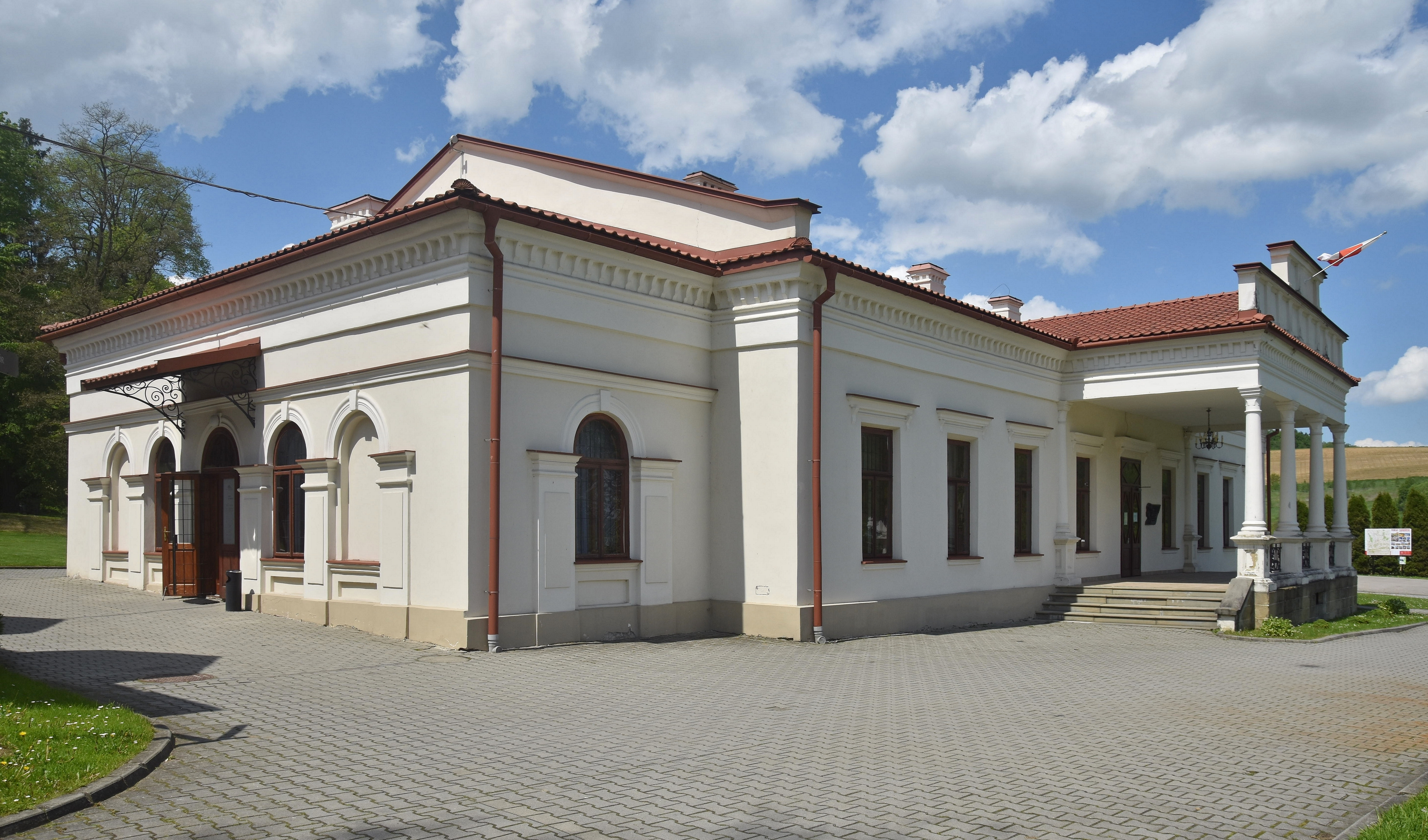 Kąśna Dolna, Dworek Ignacego Paderewskiego w Kąśnej Dolnej